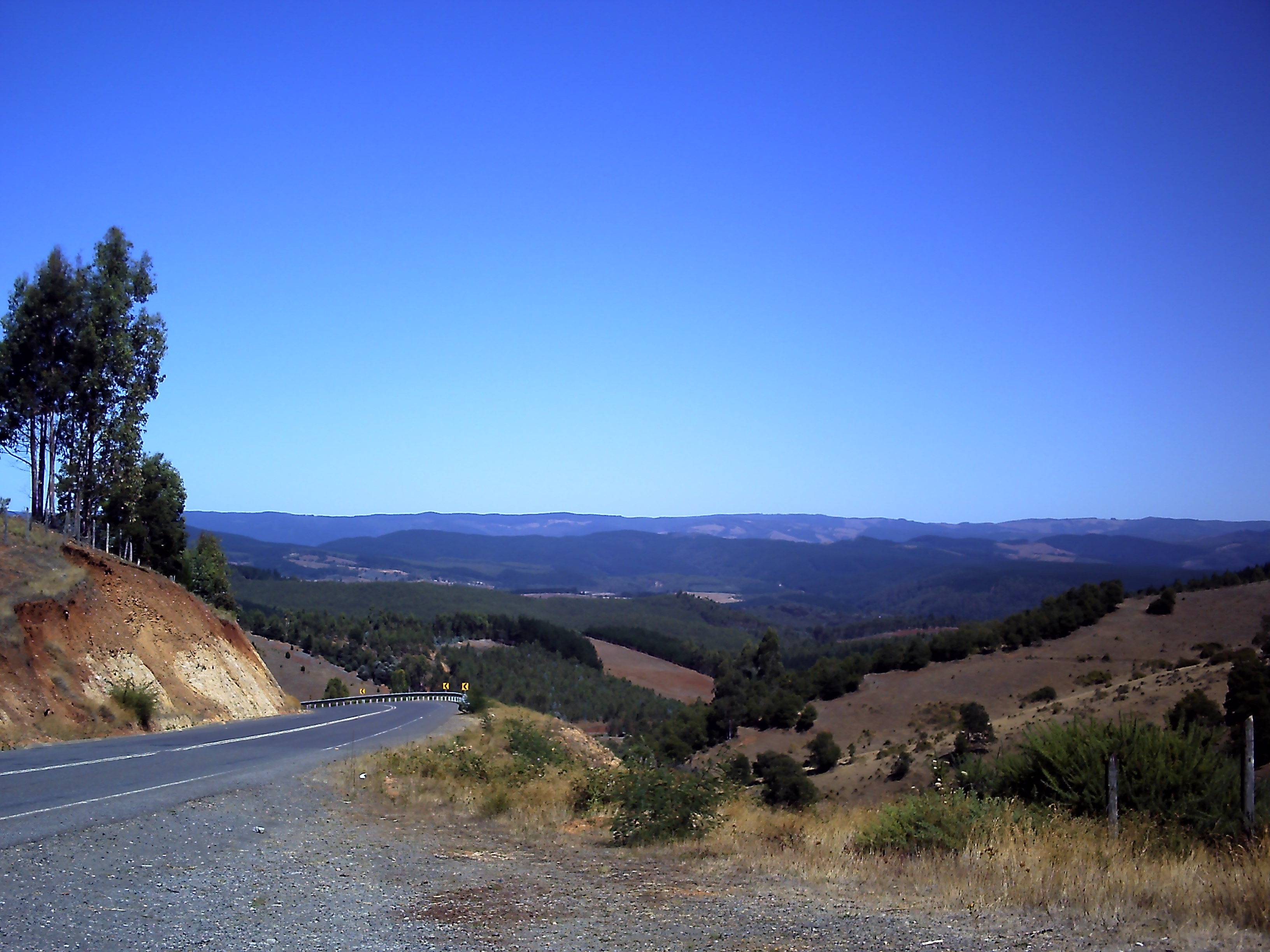 Camino a Capitán Pastene desde Lumaco